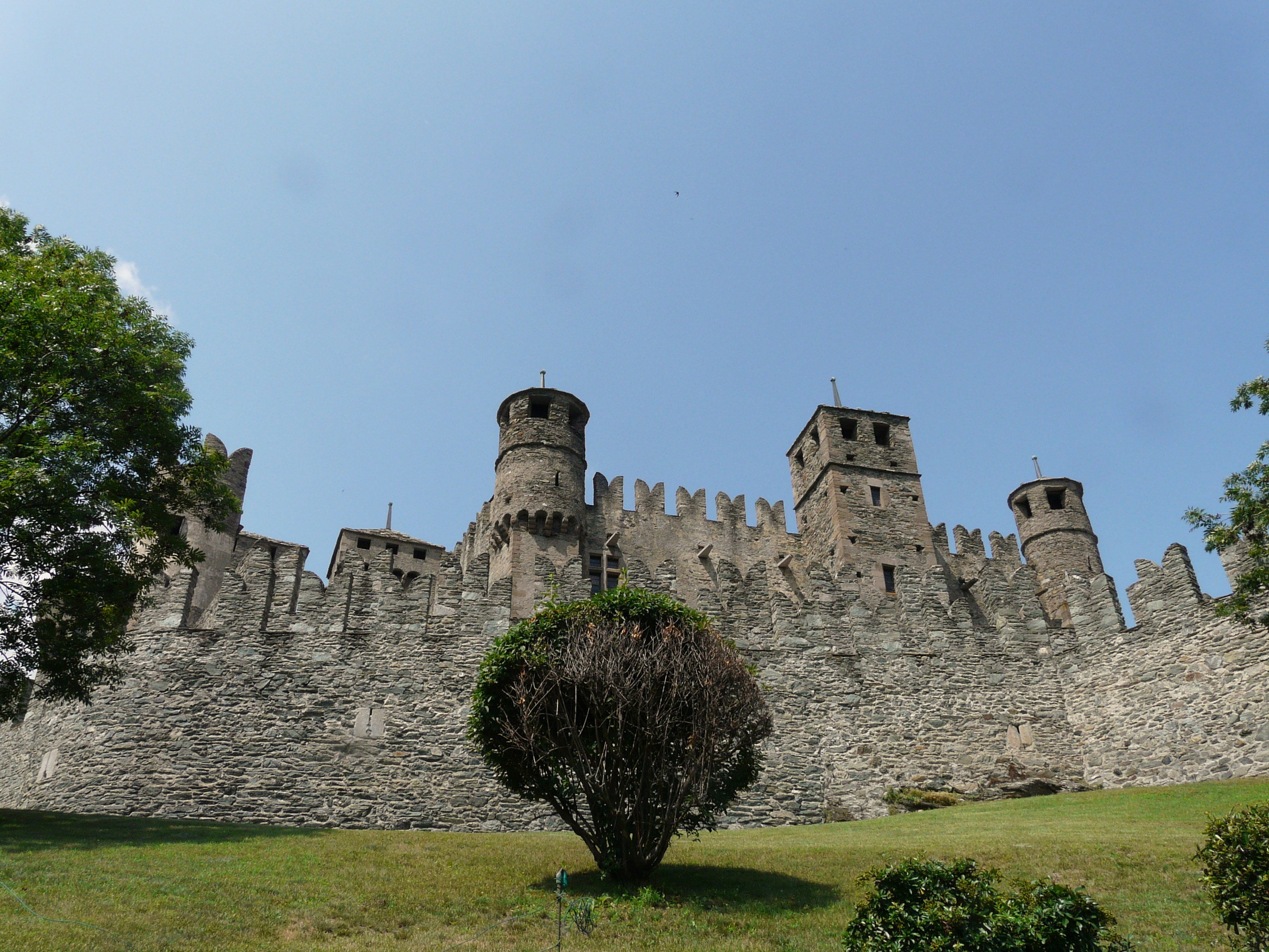 Serie di immagini del Castello di Fénis, Valle d'Aosta, Italia